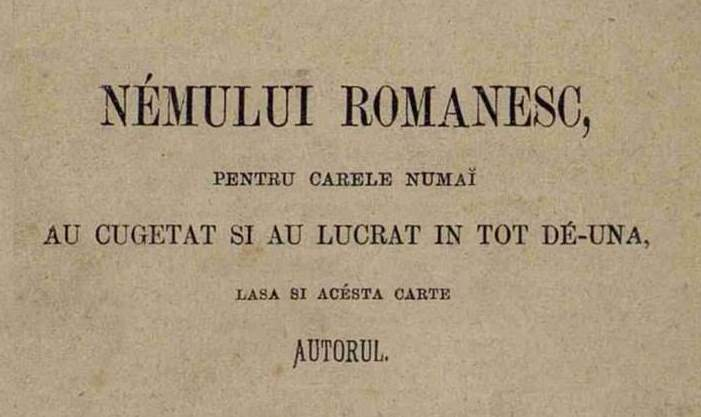 Dédicace de l'ouvrage de 1874Română: Dedicația de pe lucrarea lui G. R. Melidon „Manualul invĕțietorului”